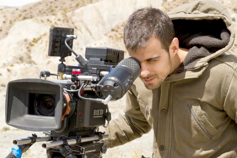 Ángel Gómez Hernández durante el rodaje de Y la muerte lo seguía (2012)